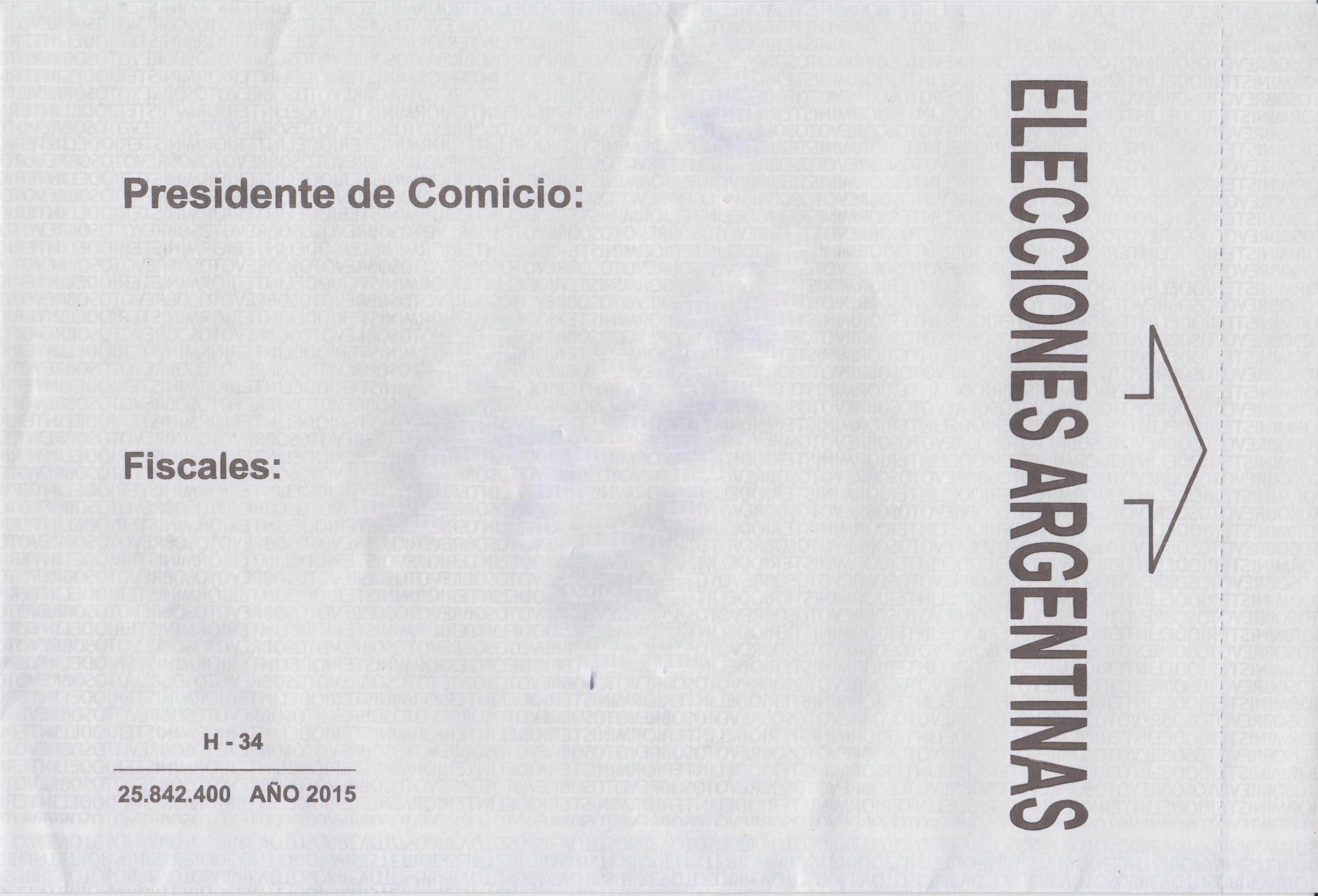 Sobre para votar en las elecciones generales de Argentina de 2015.